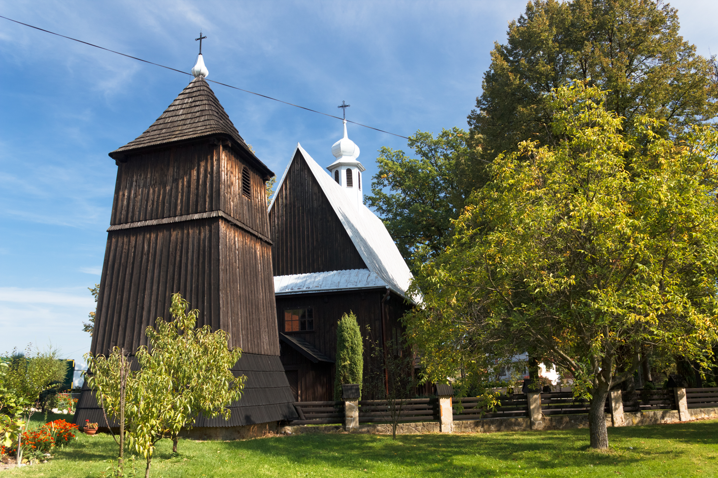 Kościół p.w. św. Mikołaja Moszczenica Niżna, Stary Sącz